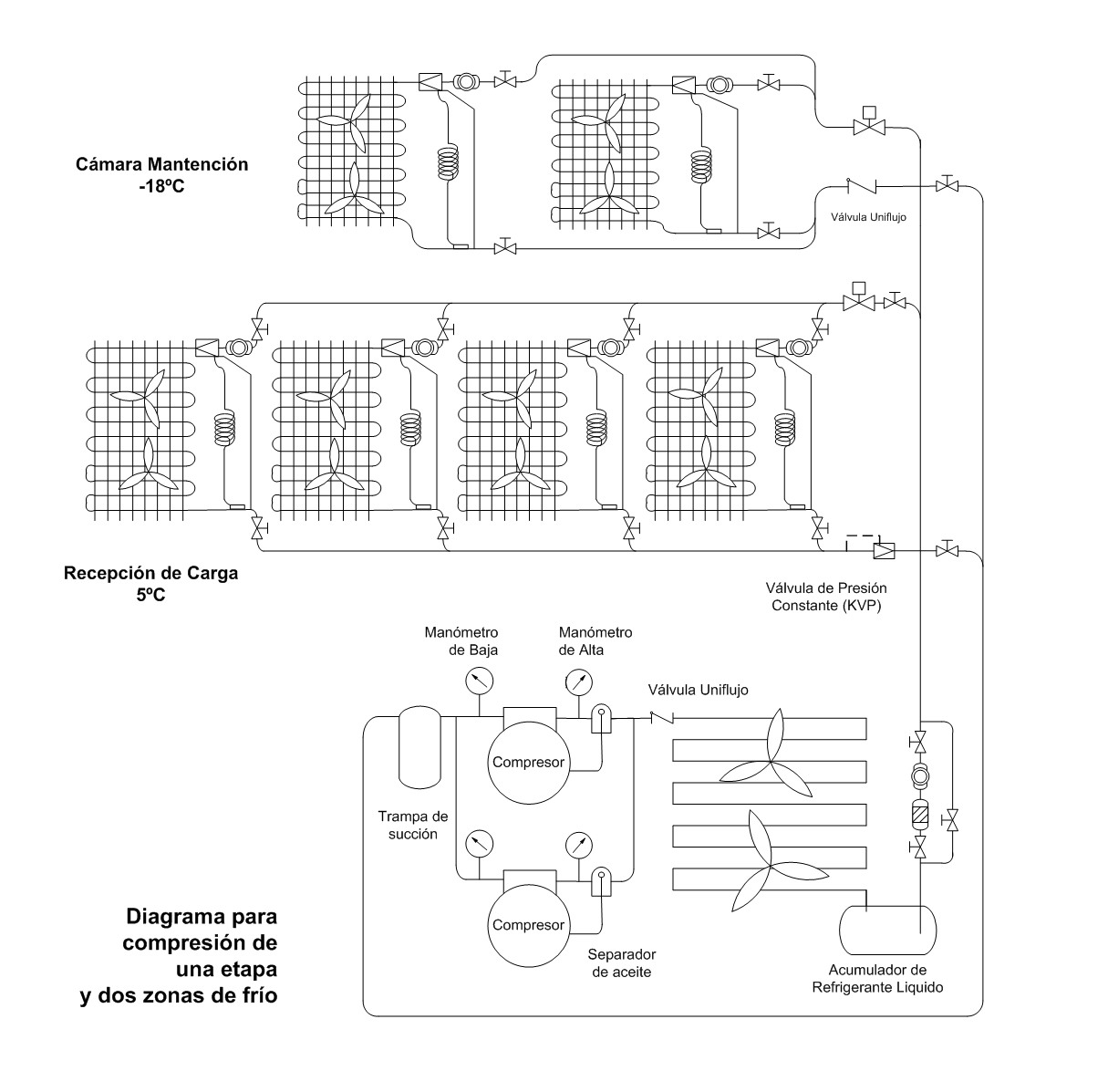 Diagrama de Flujo de sistema frigorífico de simple etapa y dos zonas de frío. Dibujo, Ing. Pablo Méndez.